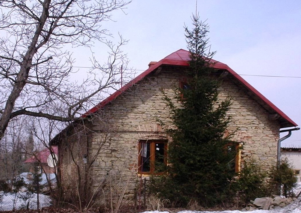 dom z kamienia łamanego przy dawnym rynku w Nowotańcu, dawna karczma Thalenbergów